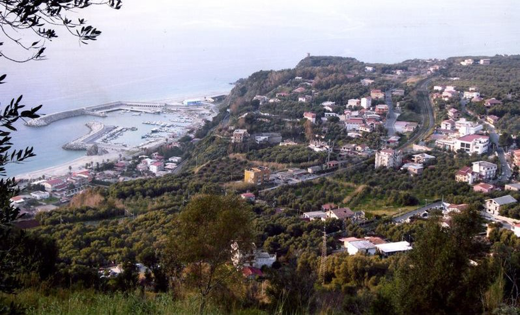 Panorama di Taureana di Palmi e del porto di Palmi in località Tonnara.